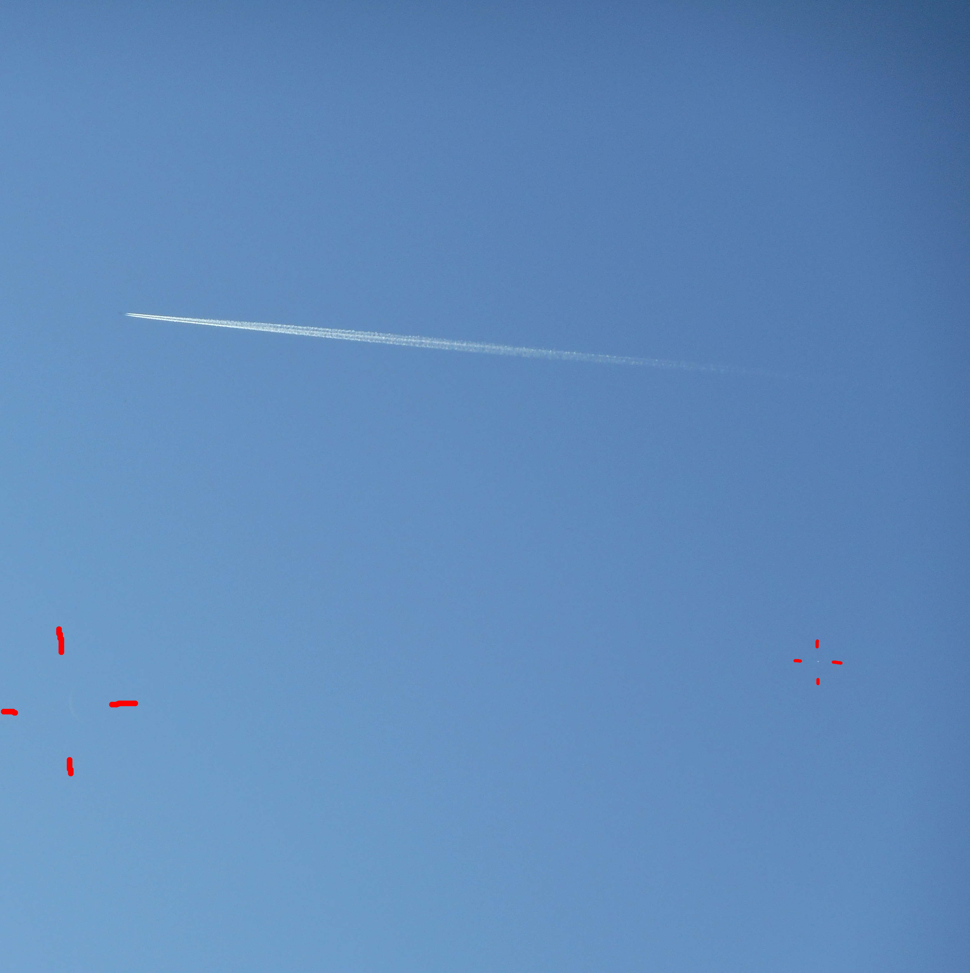 La Lune et Vénus en plein jour